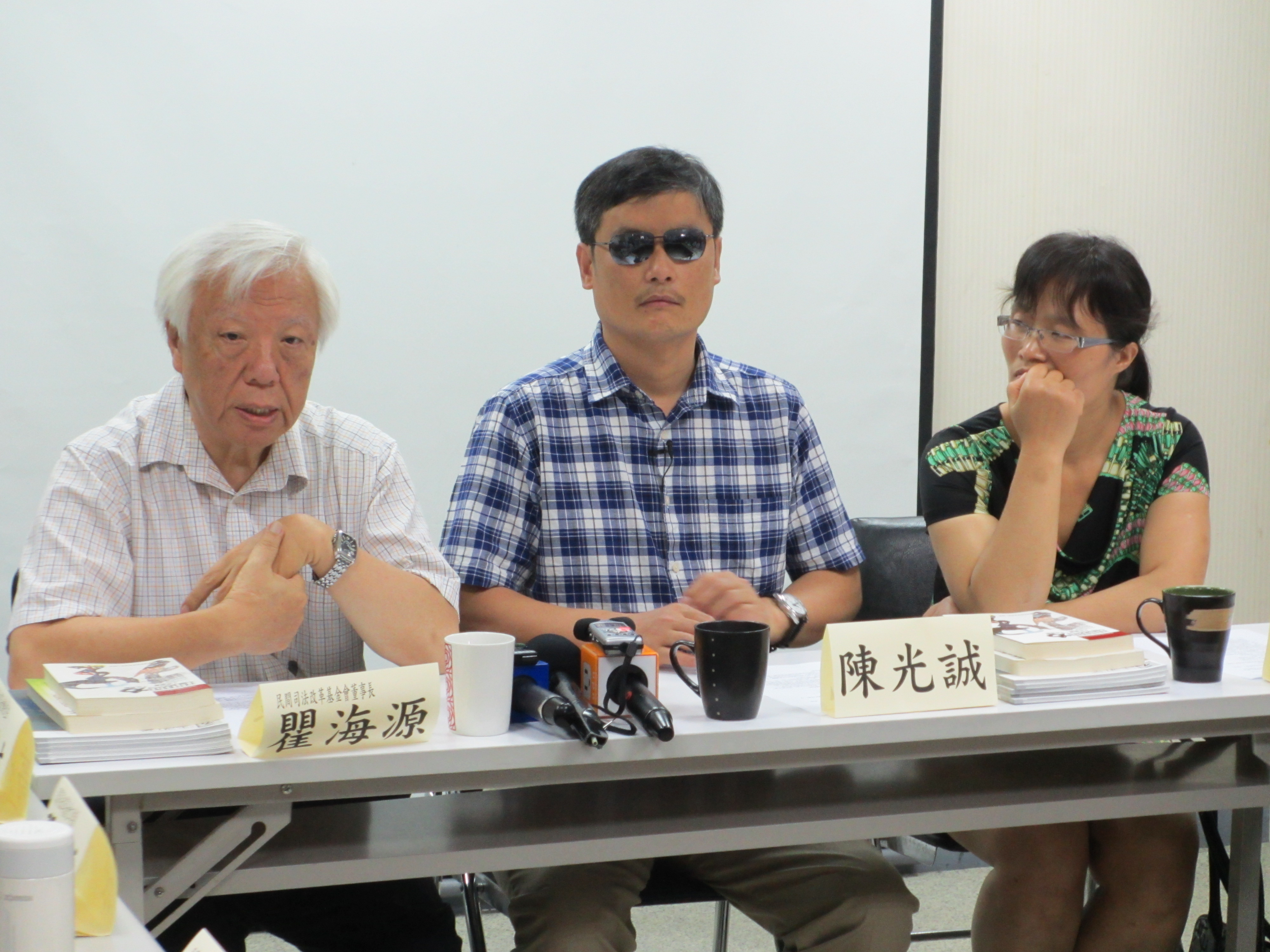 民間司法改革基金會董事長瞿海源（左）與中華人民共和國盲人維權人士陳光誠（中）。